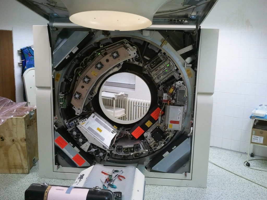 pohled na otevřený přístroj výpočetní tomografie